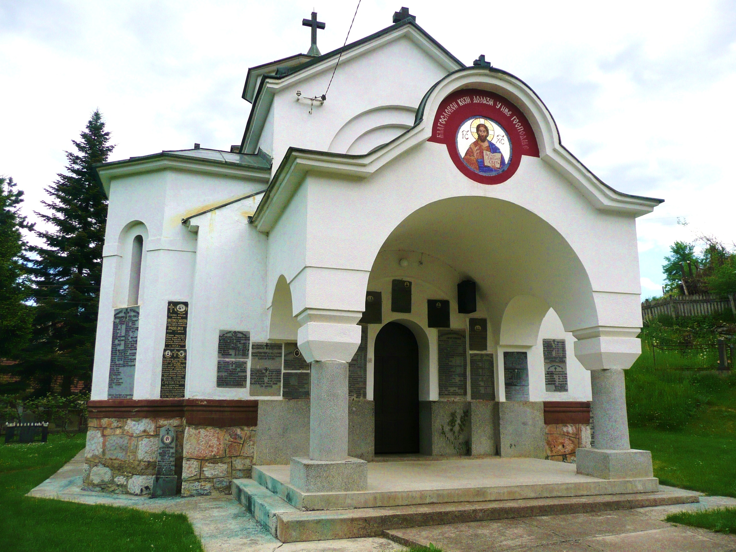 Crkva-spomen kosturnica Uspenja Presvete Bogorodice u Peckoj